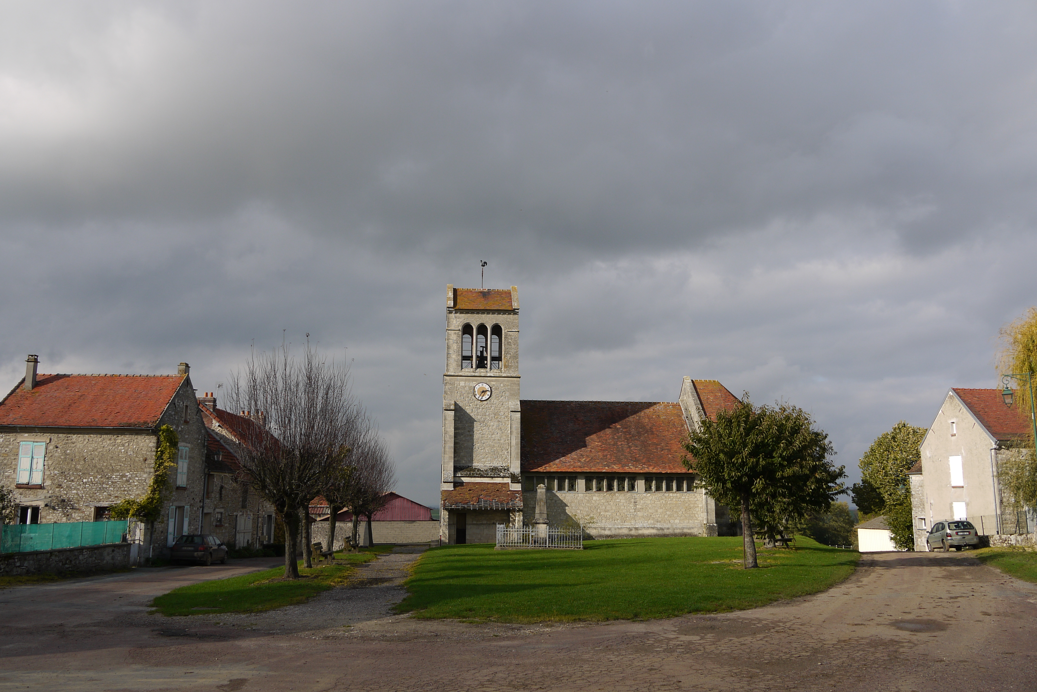 Hautevesnes, la place de l'église.